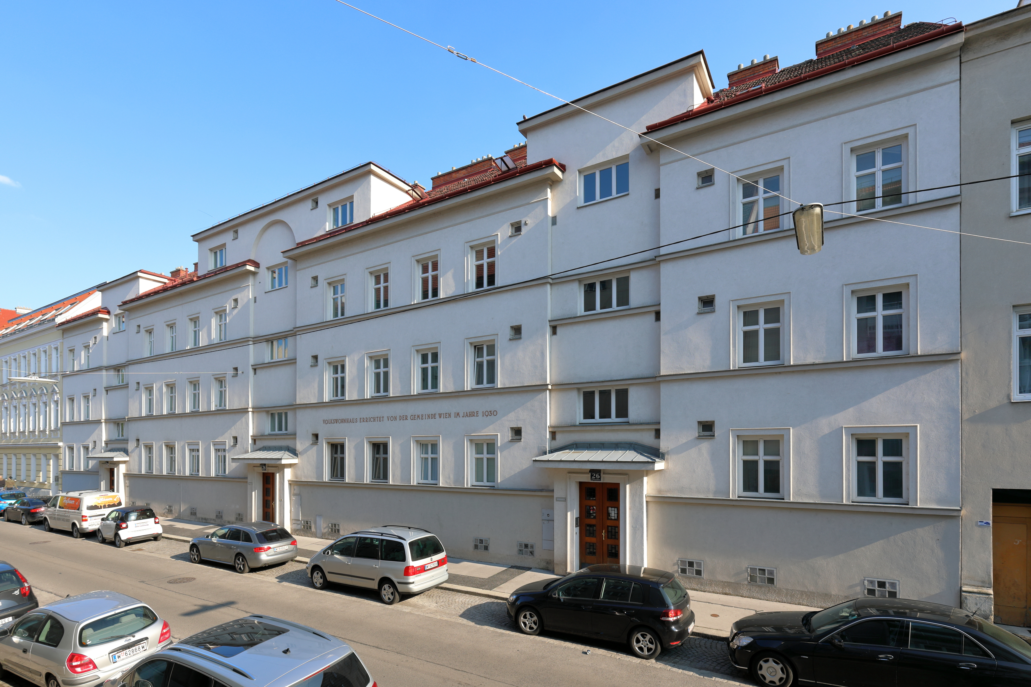 Der denkmalgeschützte Gemeindebau O'Brien-Gasse 26-30 im 21. Wiener Bezirk Floridsdorf. Errichtet wurde die Wohnhausanlage mit 63 Wohneinheiten von 1930 bis 1931 nach Plänen der Architekten Otto Nadel und Franz Zabza. This media shows the Vienna residential building (Gemeindebau) with the ID 1476.